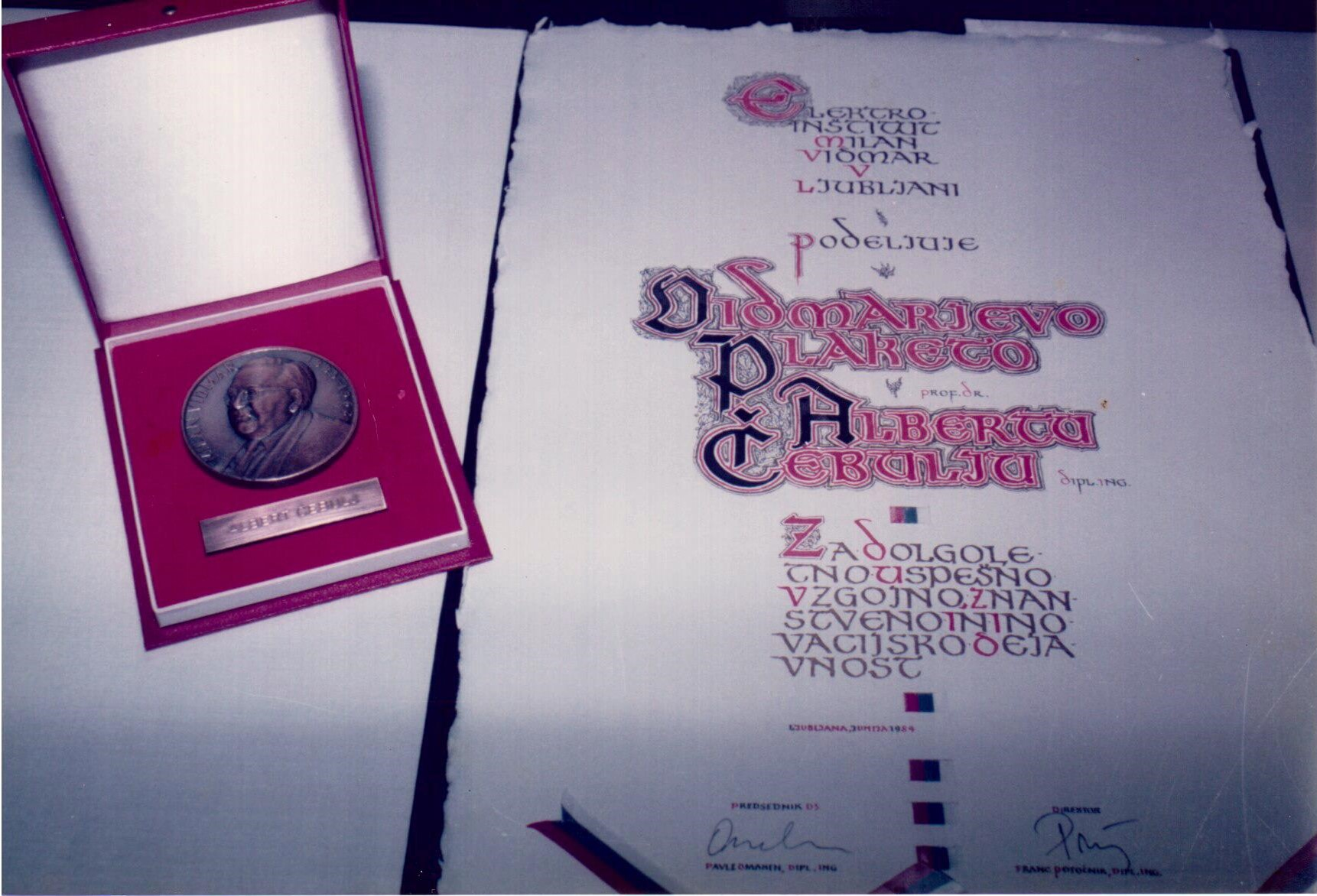 Vidmarjeva plaketa